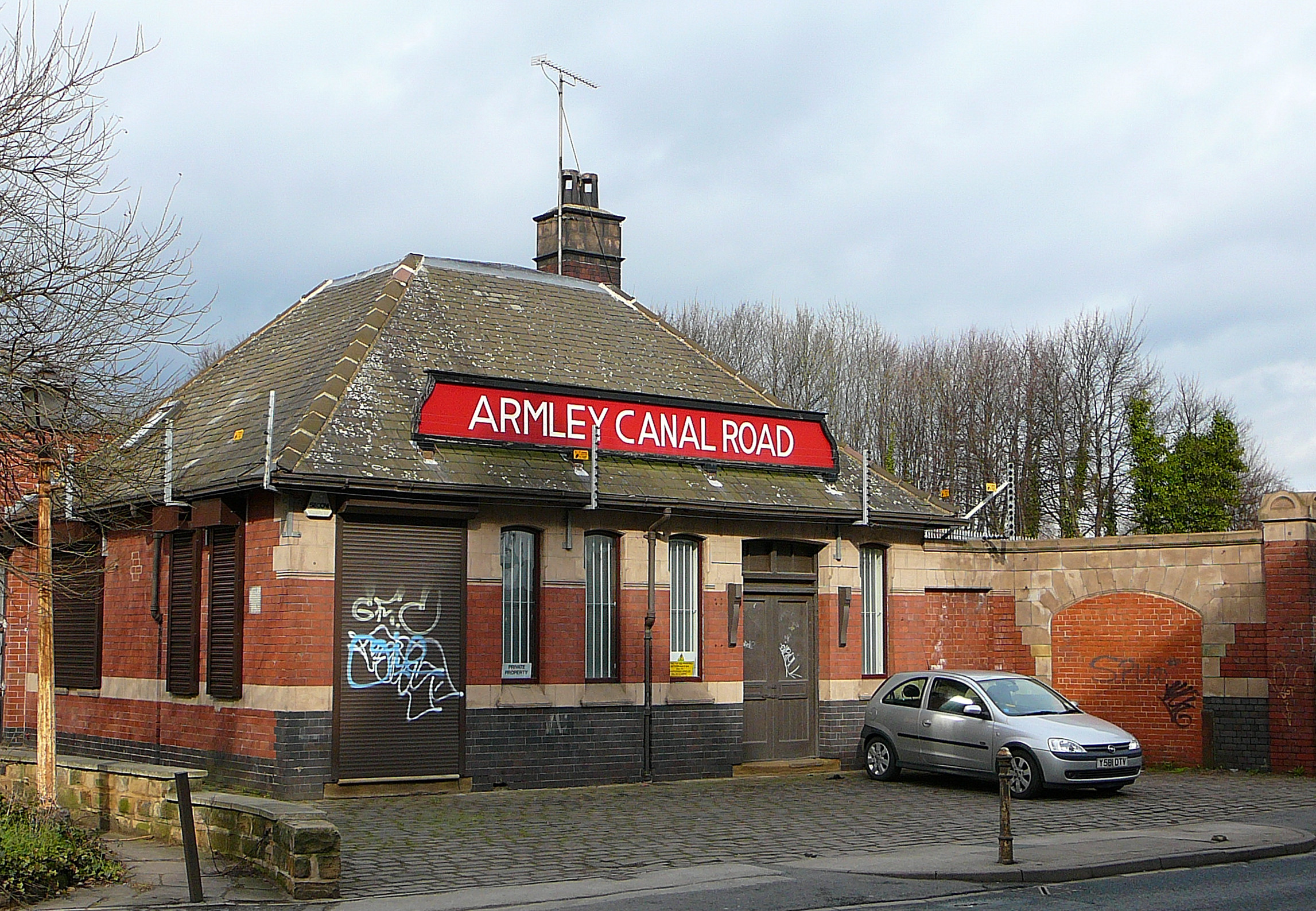 Leeds